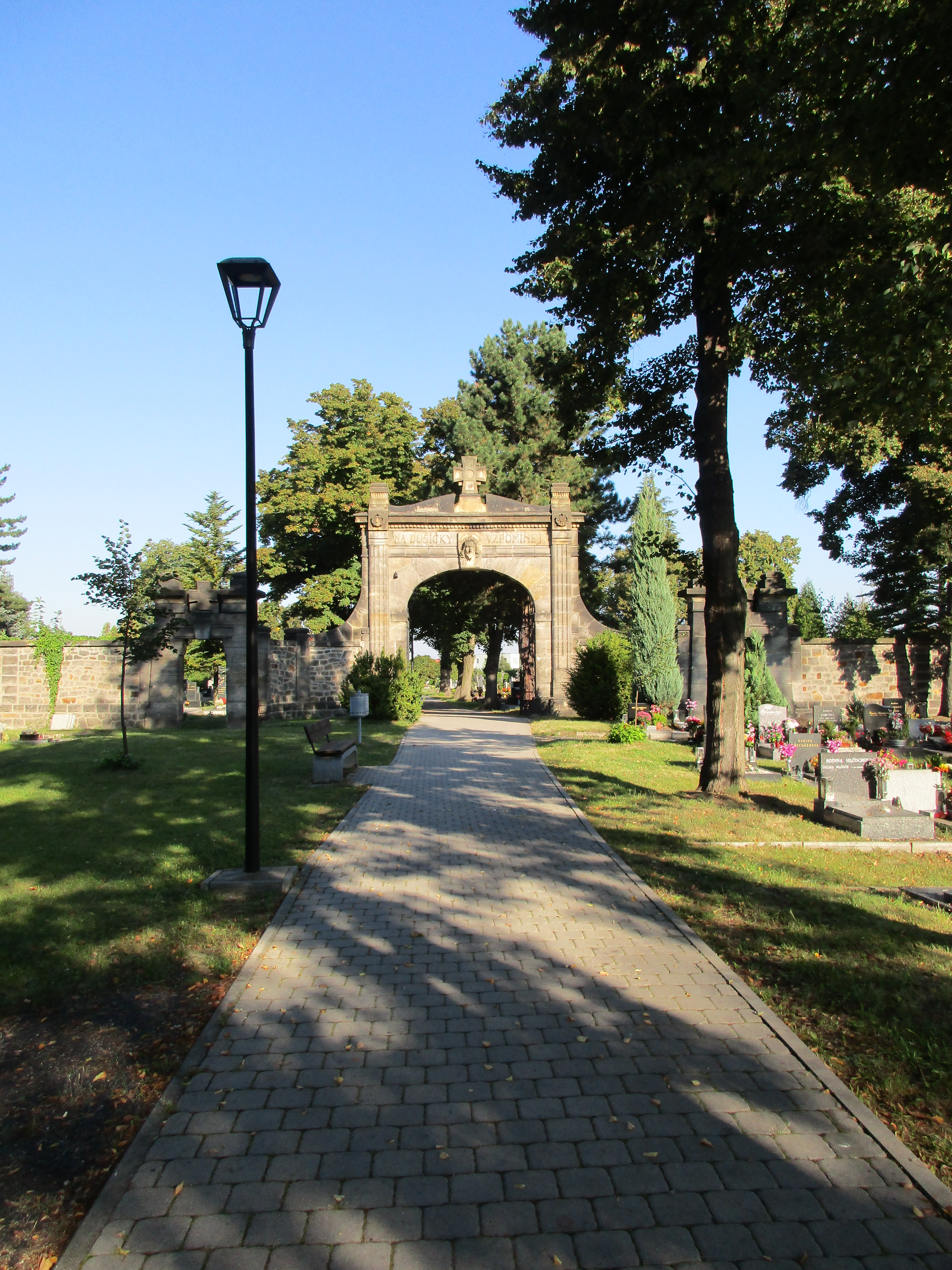 Vstupní brána - hlavní vchod.